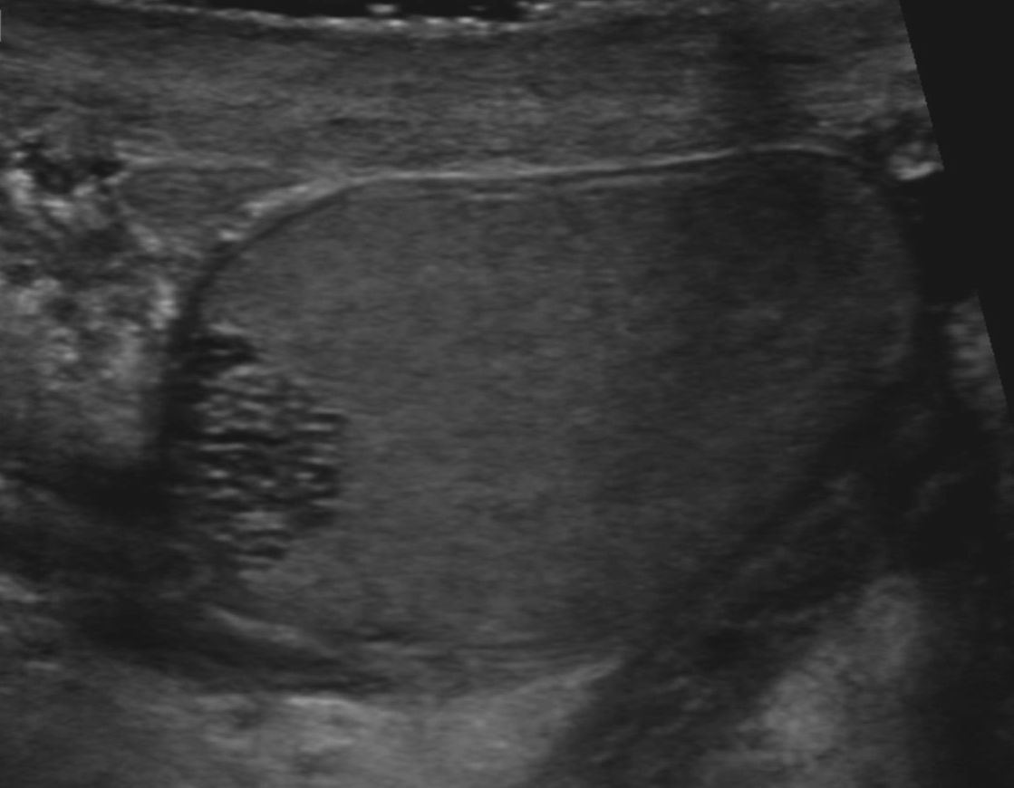 Tubuläre Ektasie des Rete testis als Zufallsbefund bei einem 81-jährigen. Der Befund liegt an typischer Stelle angrenzend an den Nebenhoden. Feine, tubuläre Aufweitungen ohne Flusssignal (DD intratestikuläre Varikozele).